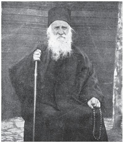 Отец Константин Гулабчев.